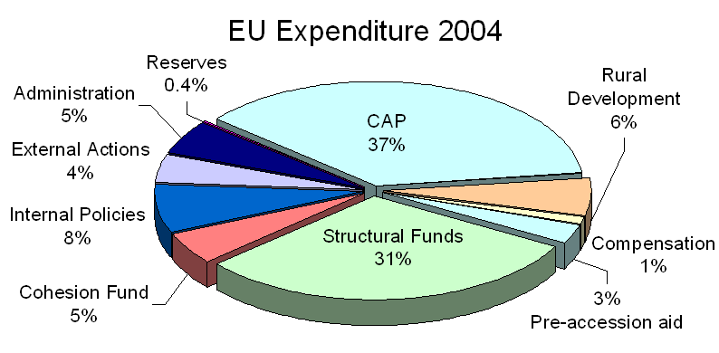 EU expenditure 2004